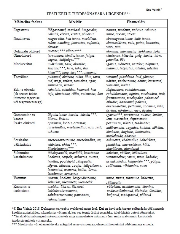 Ene Vainiku poolt koostatud eesti tundesõnade klassifikatsioon